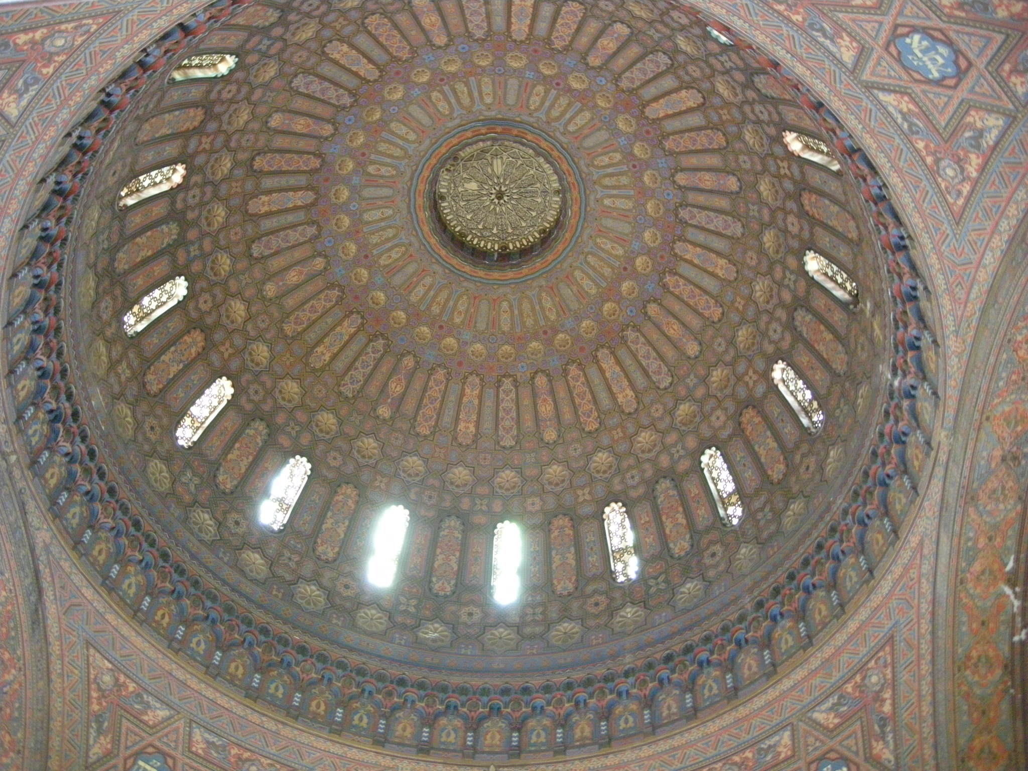 Sinagoga di firenze, interno, cupola